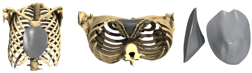 Bilder von ein 3D Implantat für die Trichterbrust